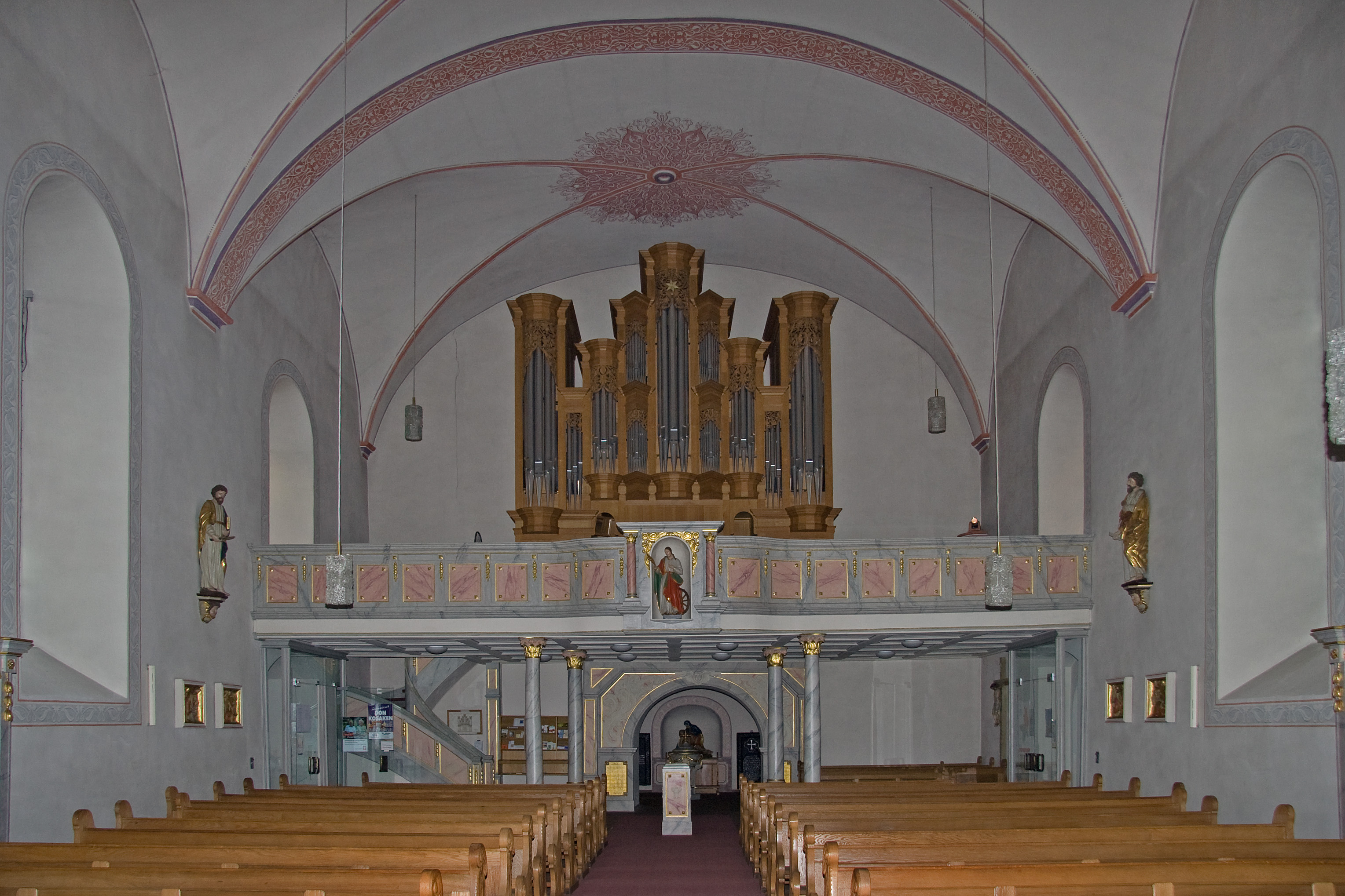 Orgel der Pfarrkirche St. Jakobus in Winterberg